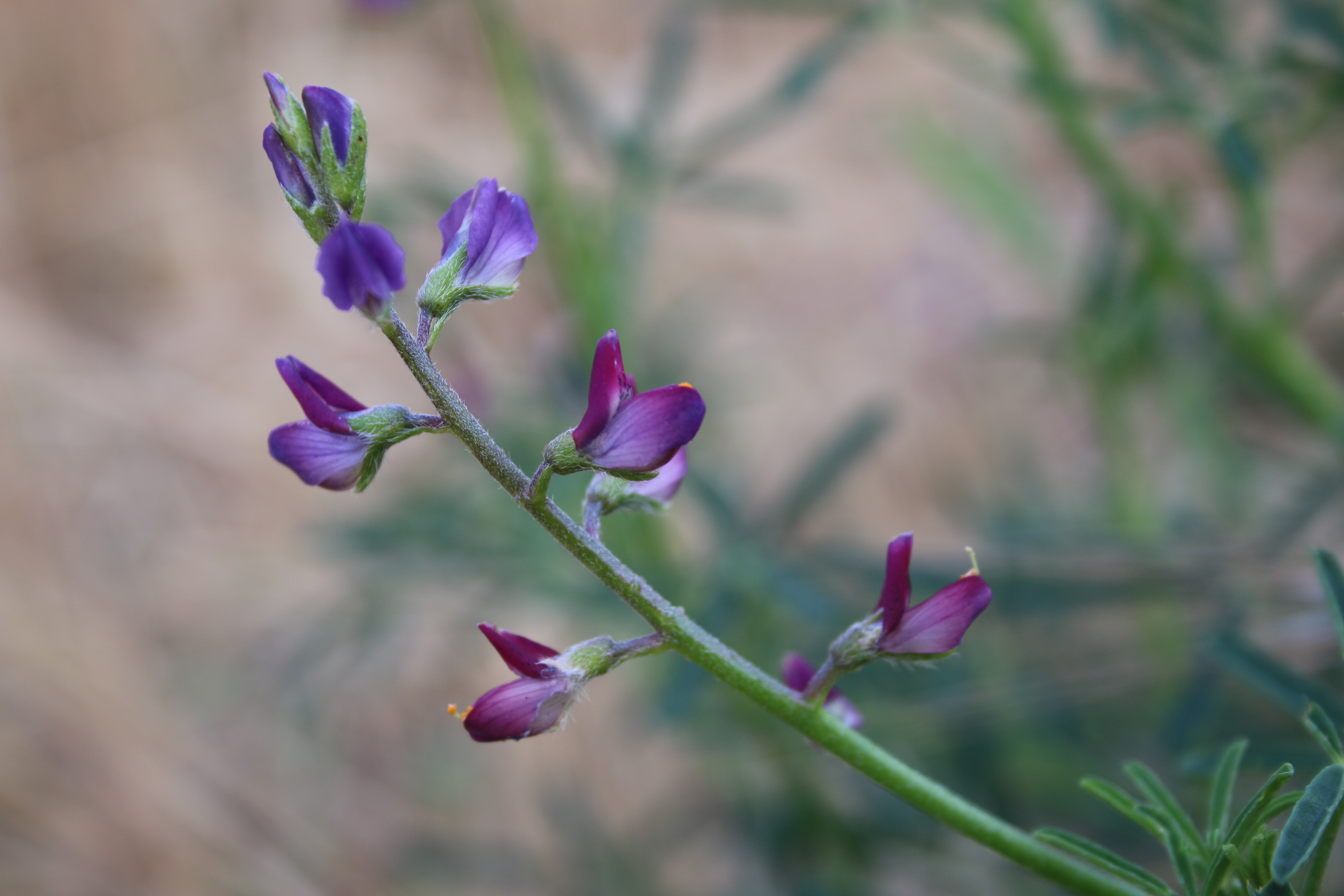 Lupinus truncatus (blunt-leaved lupine)